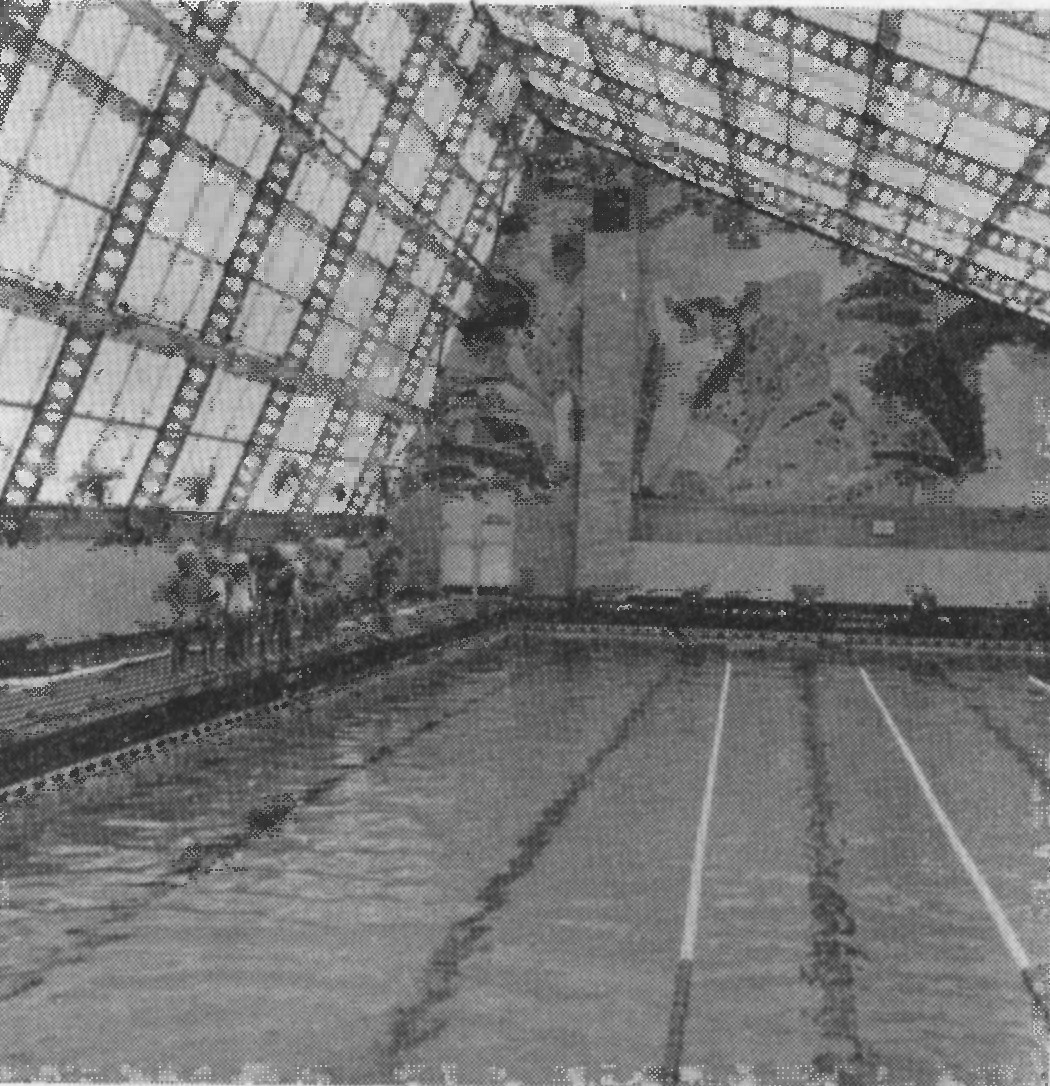 Pływalnia kryta na os. Piastowskim; wnętrze - sierpień 1976